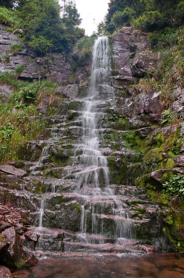 Српски (ћирилица): Копернски водопад